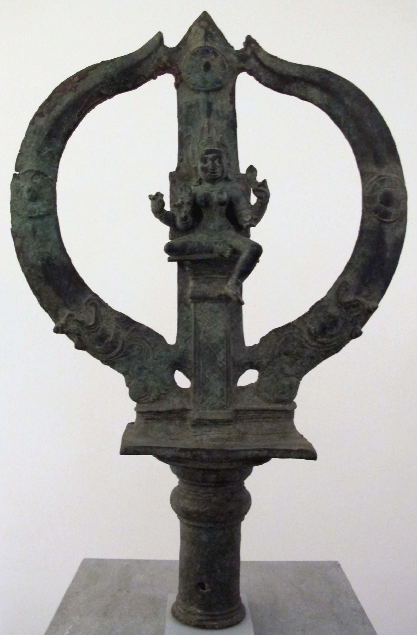 Tamil nadu, epoca cola, tridente con mariyammai, dea del vaiolo, x sec.